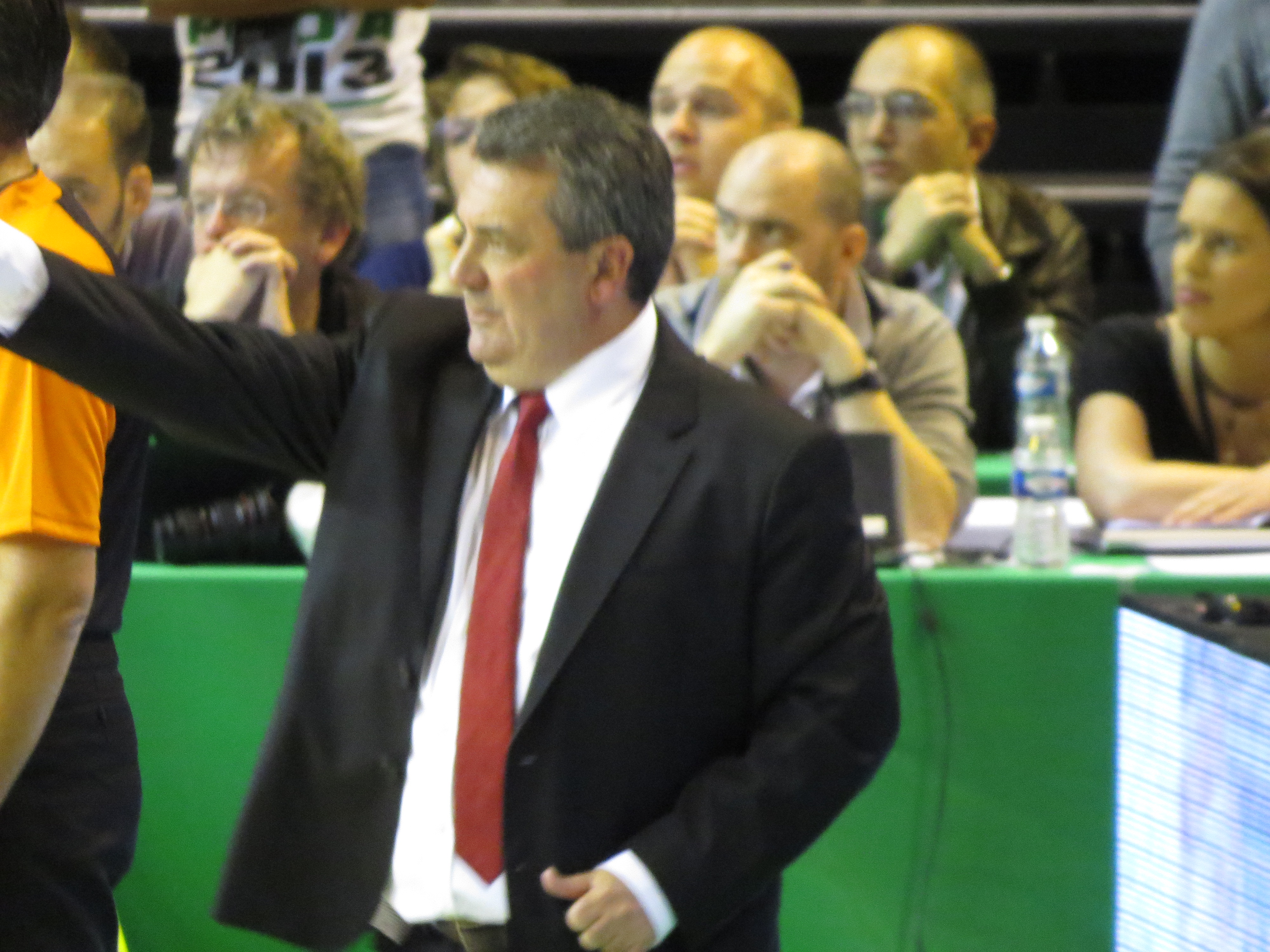 Match d'Euroligue entre Nanterre et le CSKA Moscou à la halle Carpentier (Paris). Victoire du CSKA 62-59.